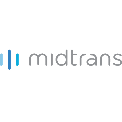 Midtrans, terintegrasi dengan ekosistem pembayaran Gojek Group, merupakan payment gateway terbesar di Indonesia yang menyediakan layanan pemrosesan pembayaran online secara komprehensif bagi ribuan mitra – mulai dari UMKM, institusi finansial, hingga perusahaan multinasional.